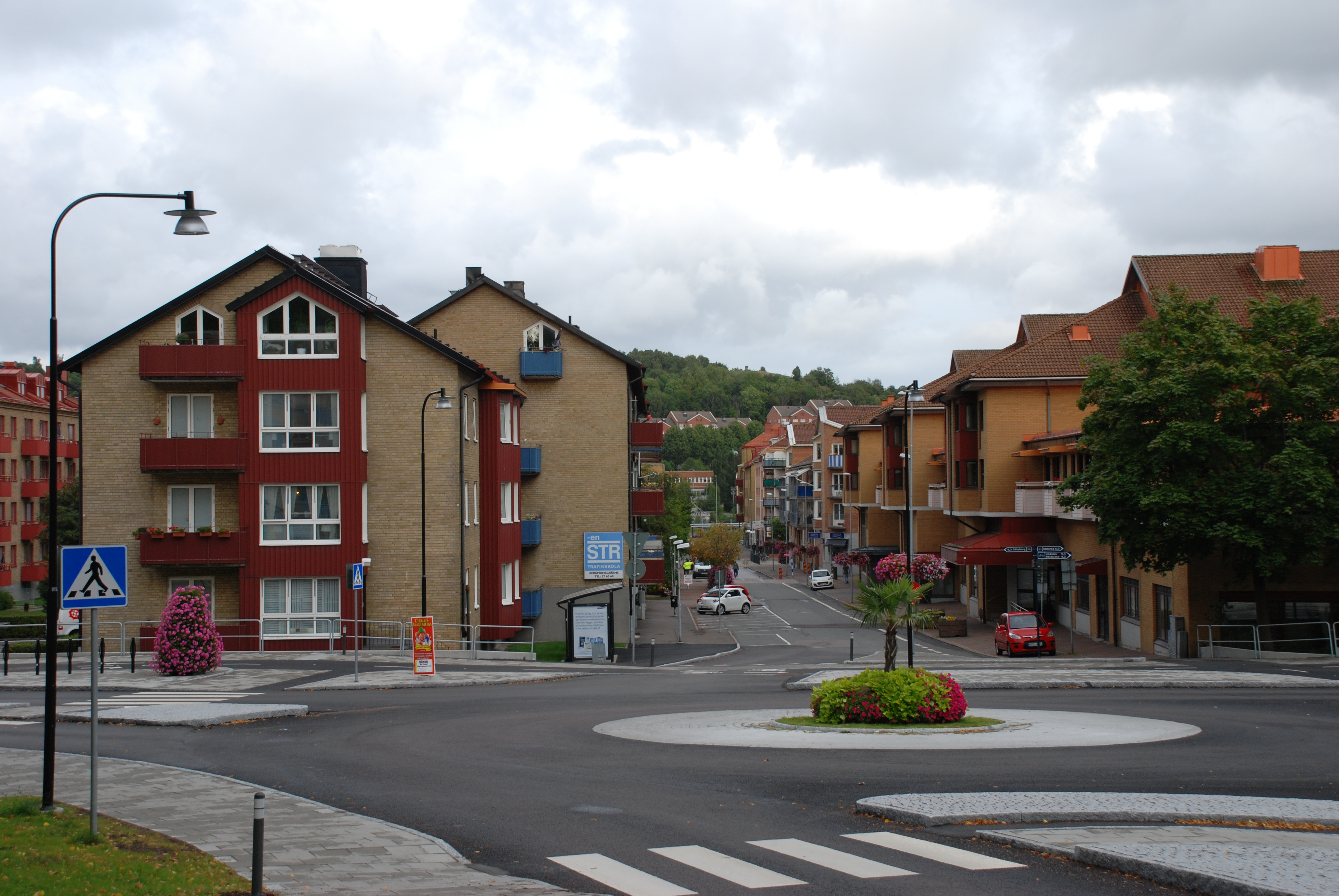 Bergmansgatan i centrala Mölndal, sedd från Storgatan.